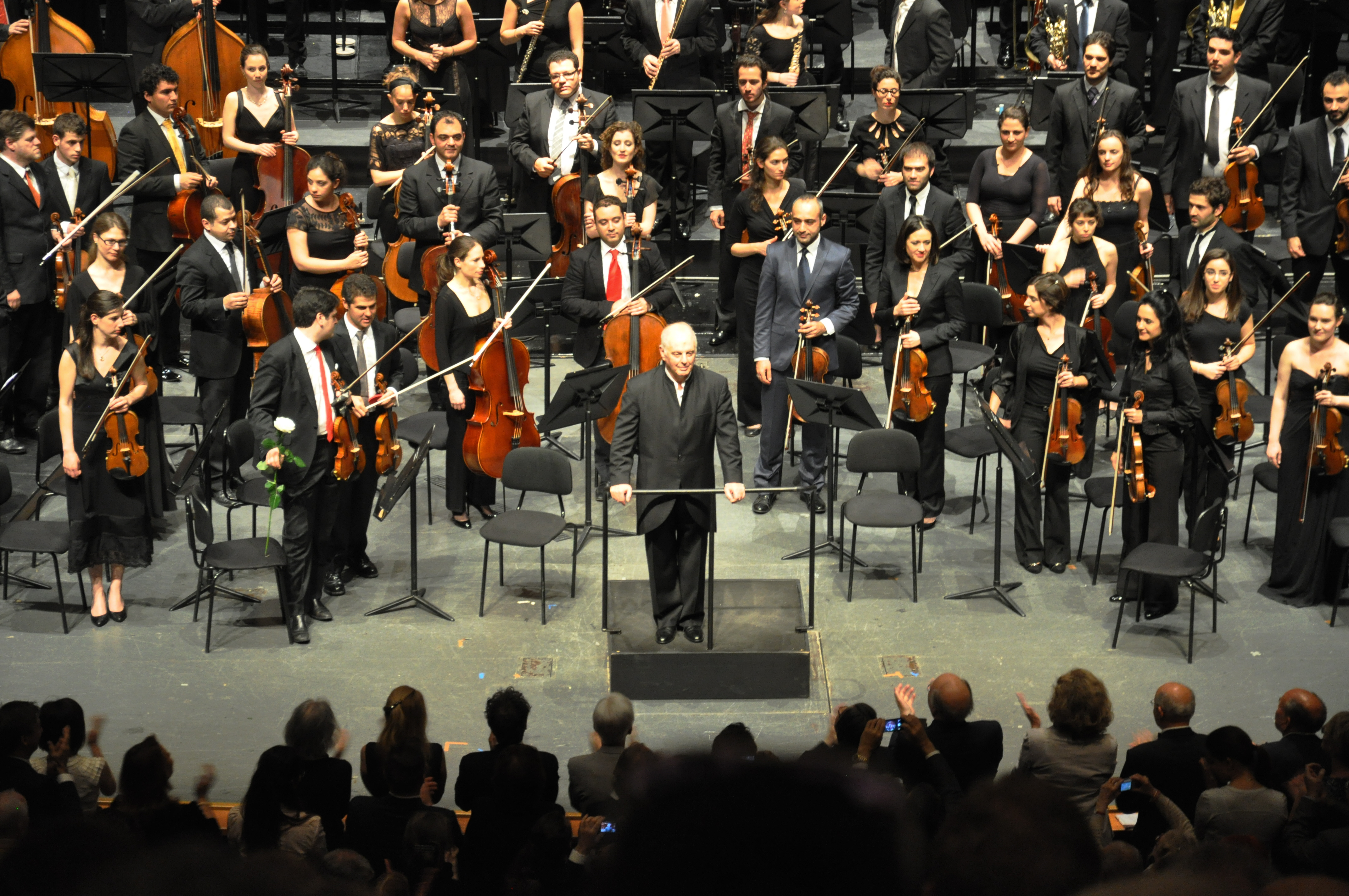 West-Eastern Divan Orchestra with Daniel Barenboim, Salzburger Pfingstfestspiele 2013